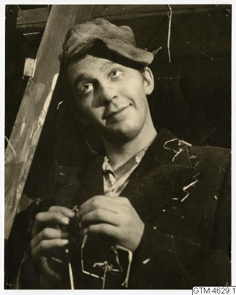 Skådespelaren Ove Tjernberg i samband med pjäsen "Hjälten på den gröna ön" (premiär 1958-01-10 på Göteborgs stadsteater).